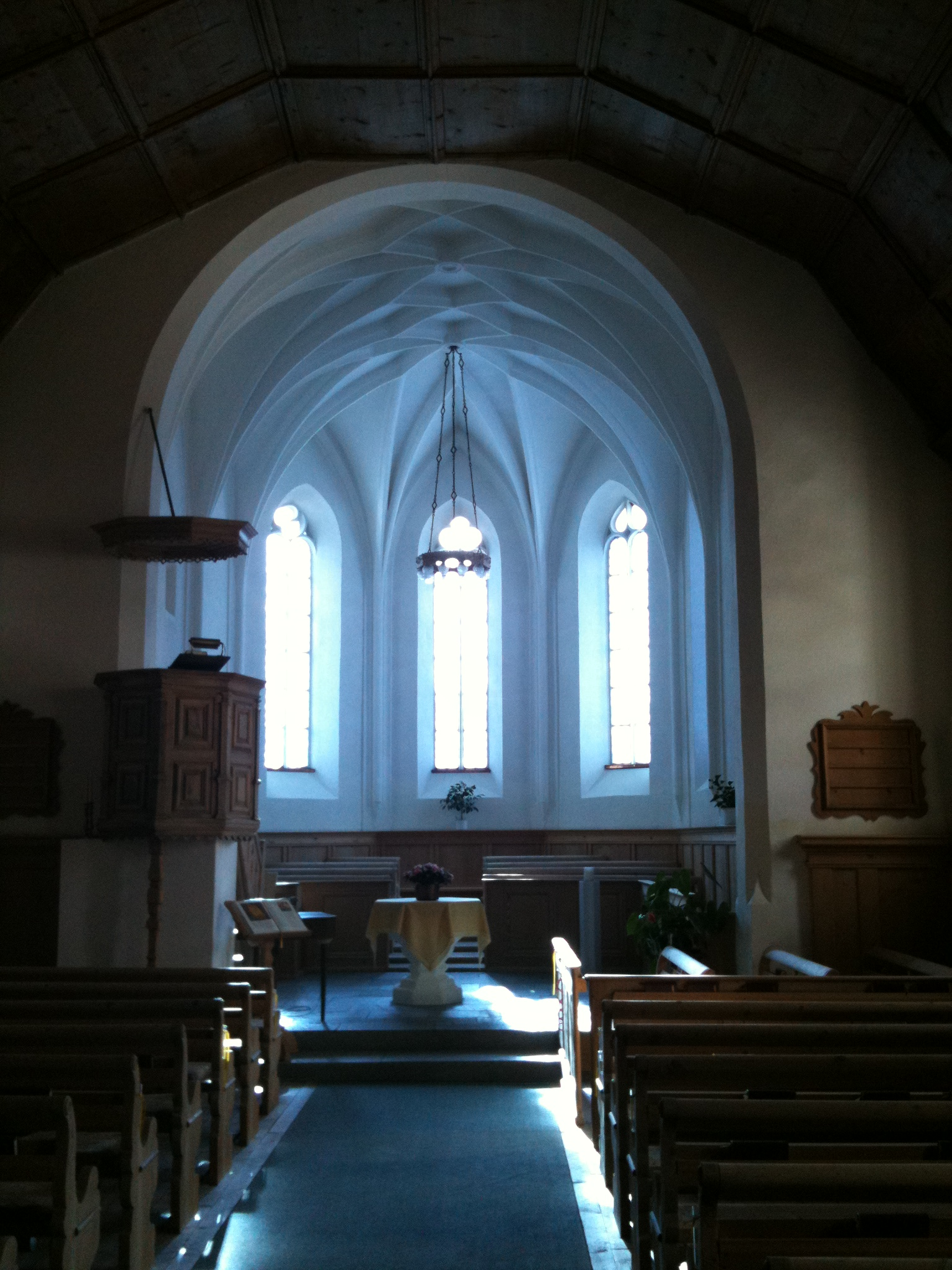 reformierte Kirche Saas im Prättigau, Kanton Graubünden